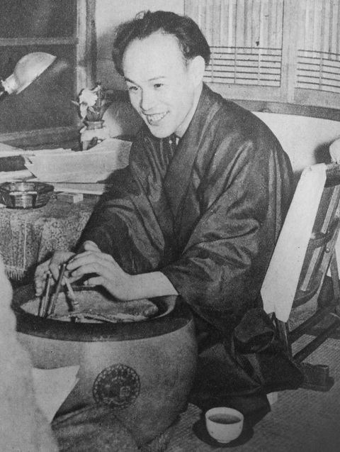 椎名麟三